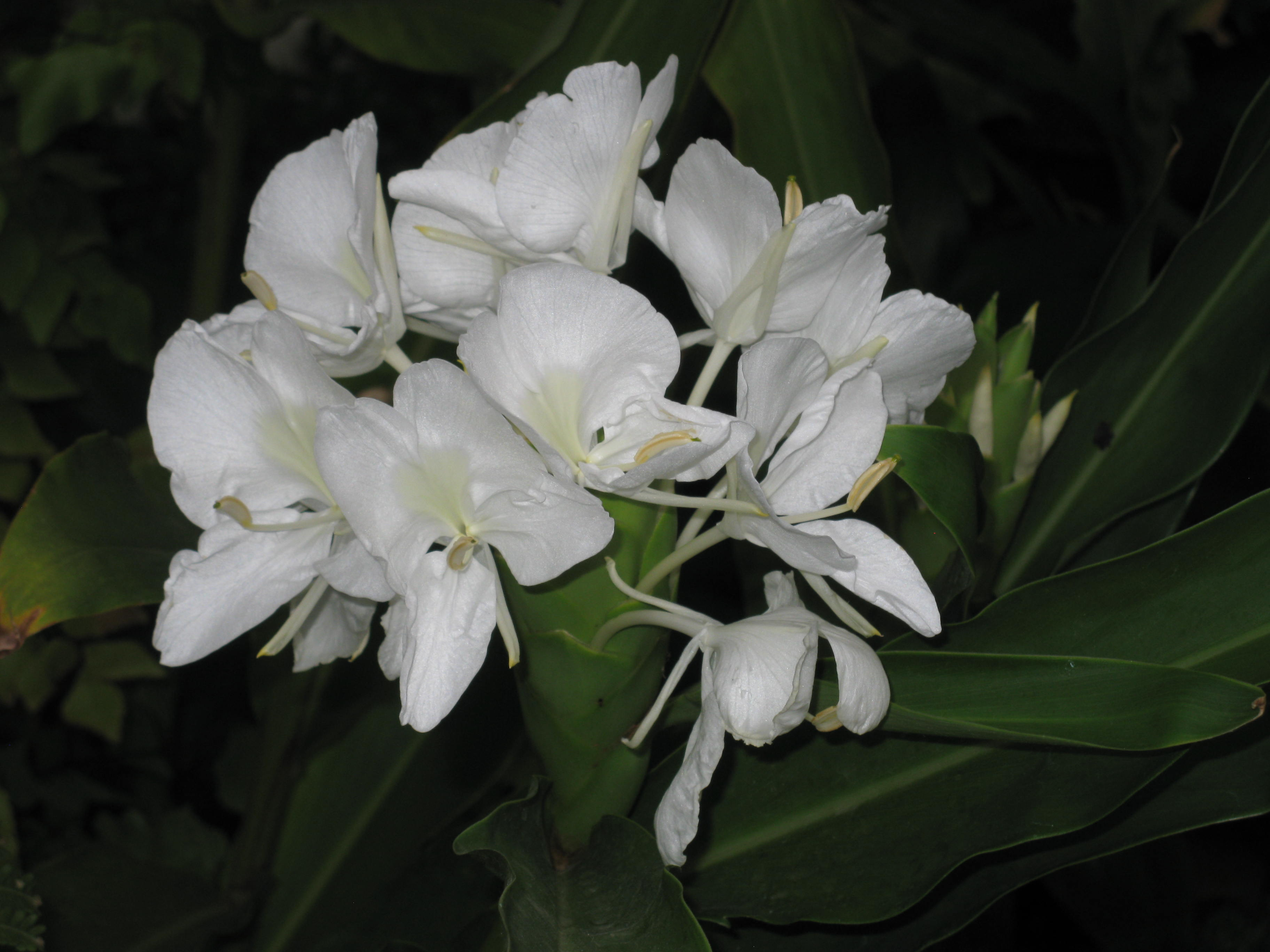 Hedychium coronarium, Jakarta, août 2011